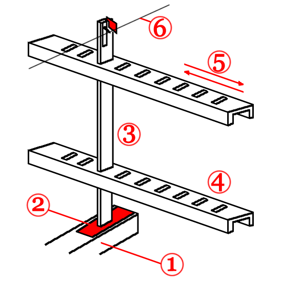 Registre de clavecin - schéma du contributeur